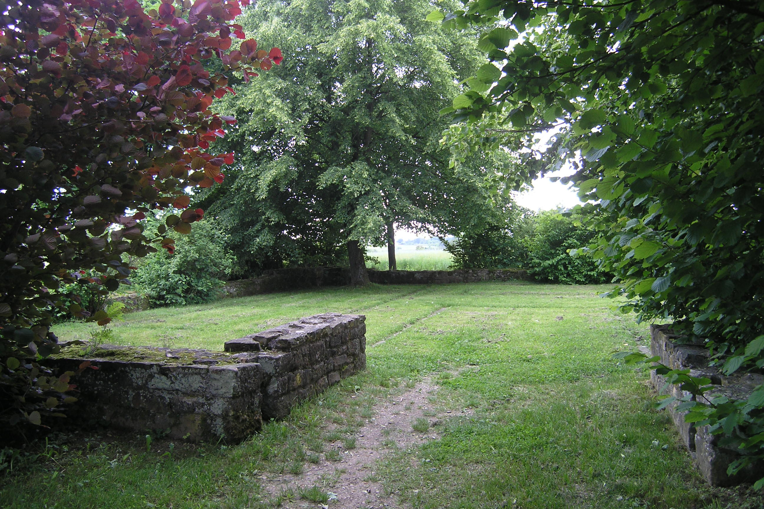 Kleinkastell Rötelsee am obergermanischen Limes; konservierte Mauerstümpfe; Innenbebauung mit Betonplatten angedeutet.